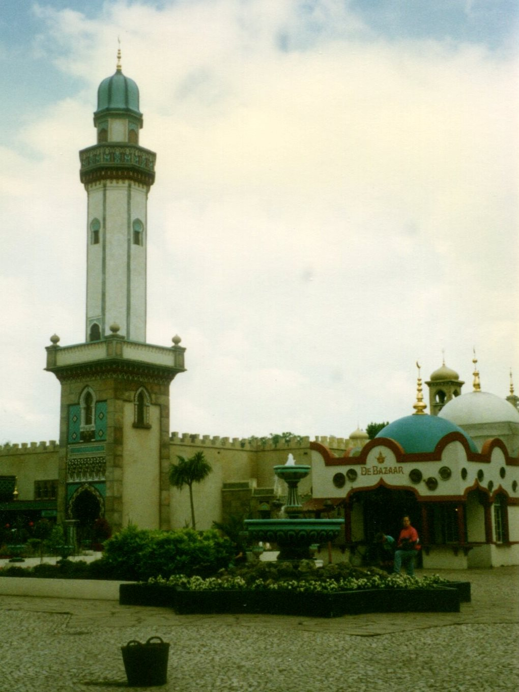 EftelingFataplein